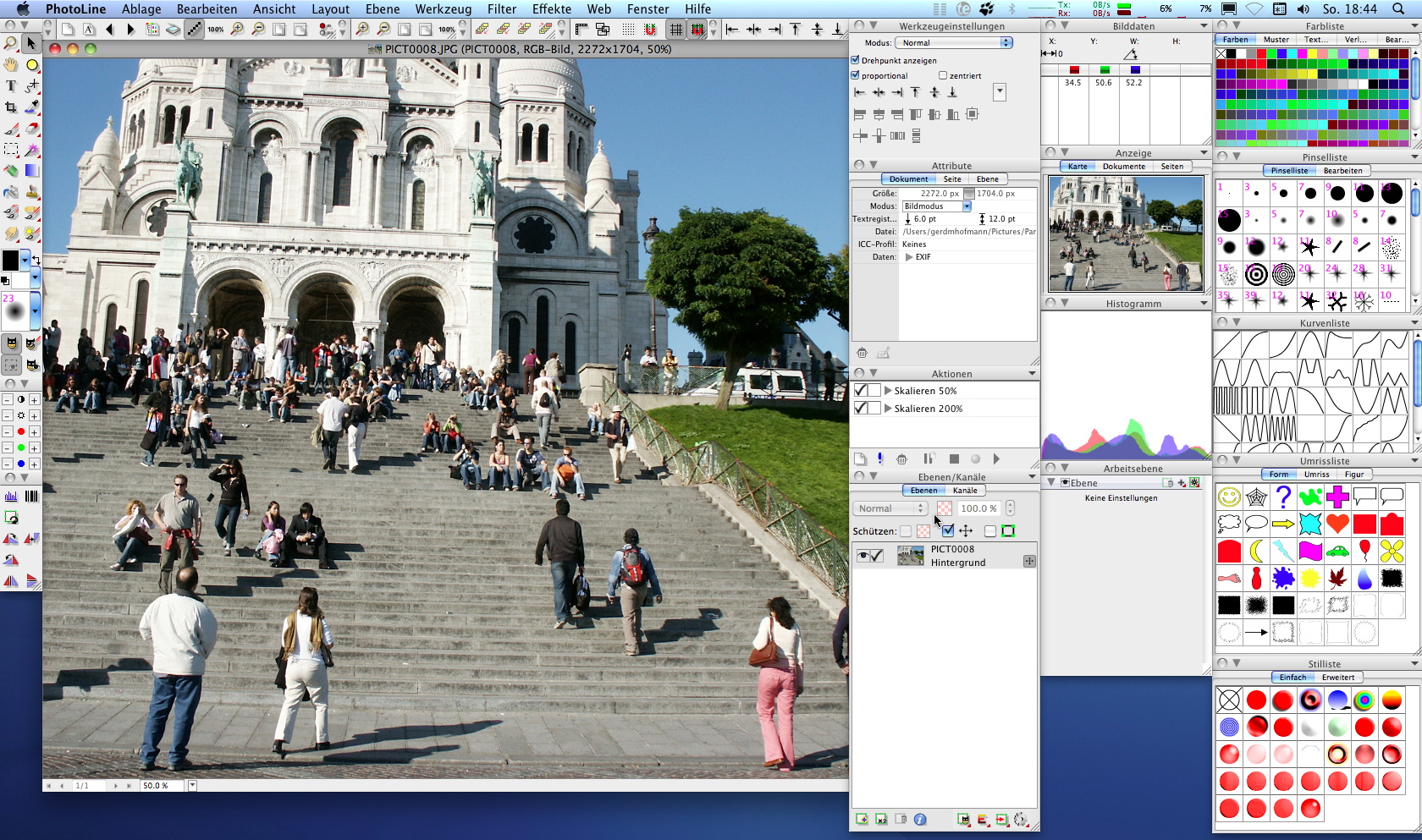 PhotoLine (Mac OS X)